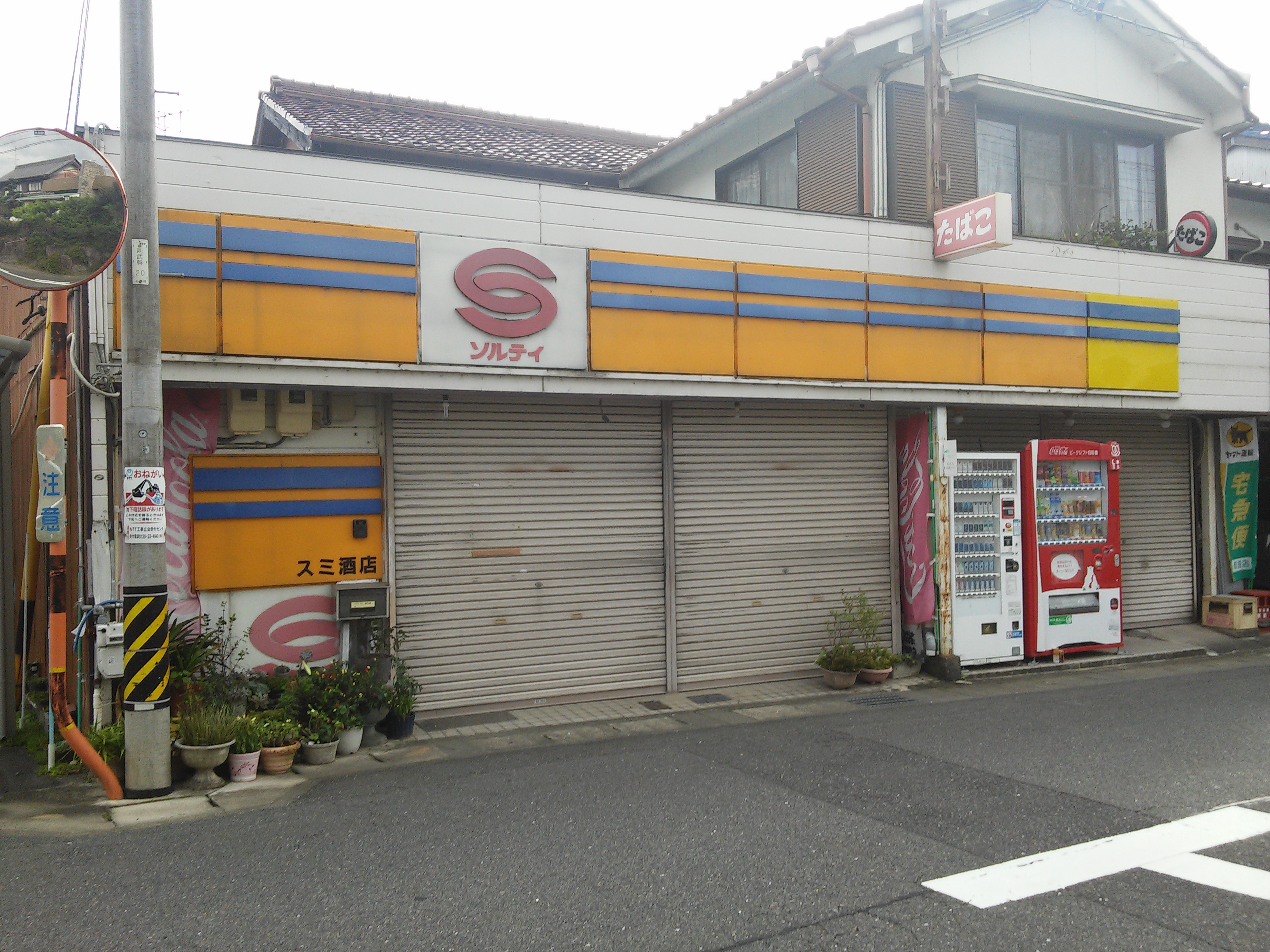 岐阜県岐阜市則武付近の、日曜日にとったソルティです。閉店または休業みたいです。